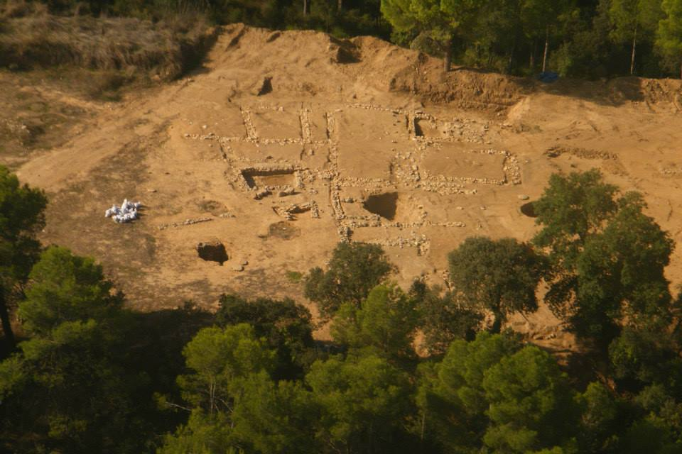 Vista aerea del yacimiento protohistórico de la Font de la Canya